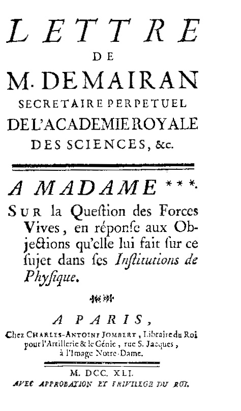 Lettre de m. de Mairan secretaire perpetuel de l'Academie royale des Sciences, &c. a madame. Sur la question des forces vives, en réponse aux objections qu'elle lui fait sur ce sujet dans ses Institutions de physique. - A Paris : chez Charles-Antoine Jombert, libraire du roi pour l'artillerie & le génie, rue S. Jacques, à l'image Notre-Dame, 1741. - [2], 52 p. ; 12º .